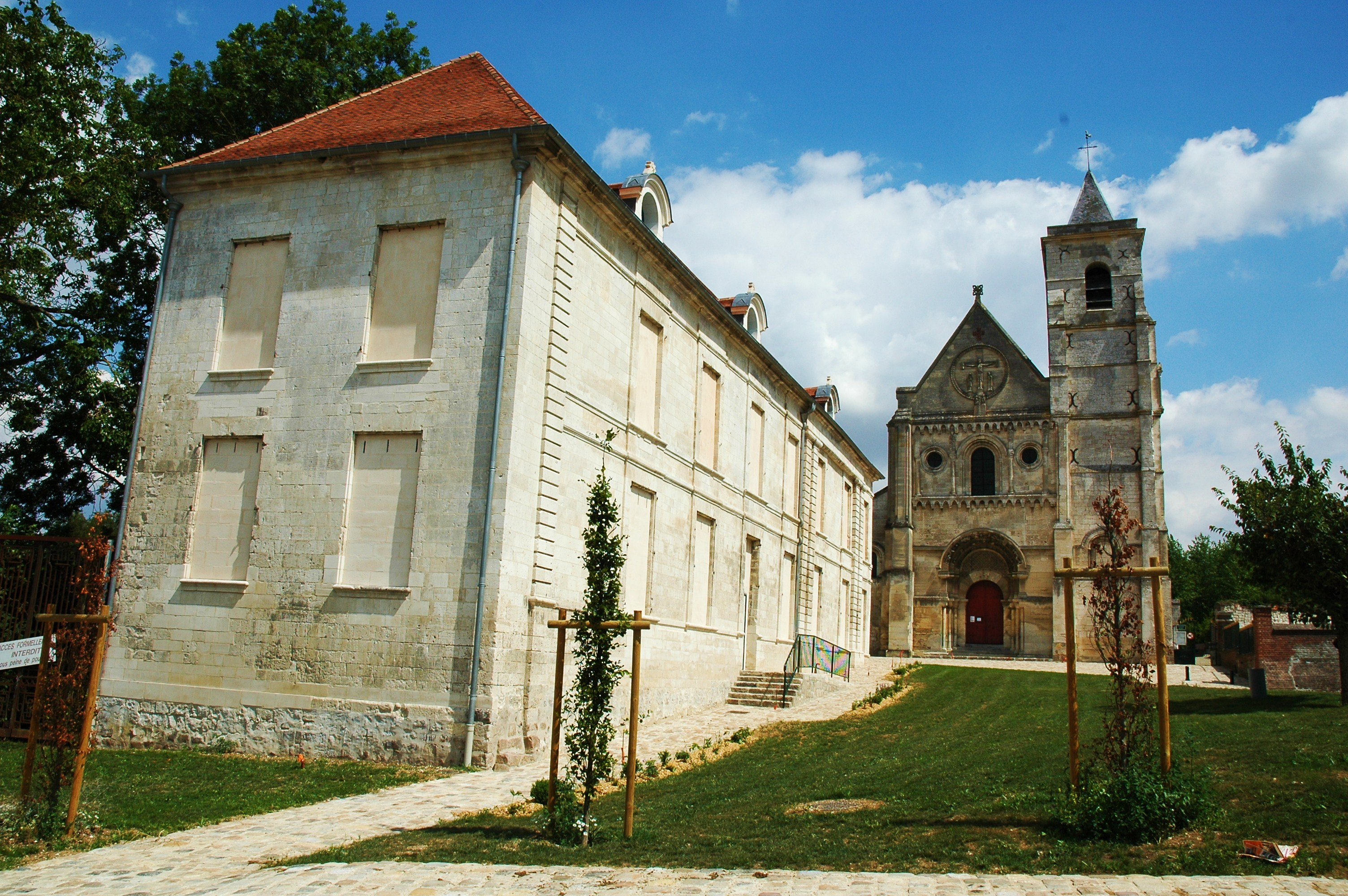 Berteaucourt-les-Dames (Somme, France). L'abbaye et l'église.